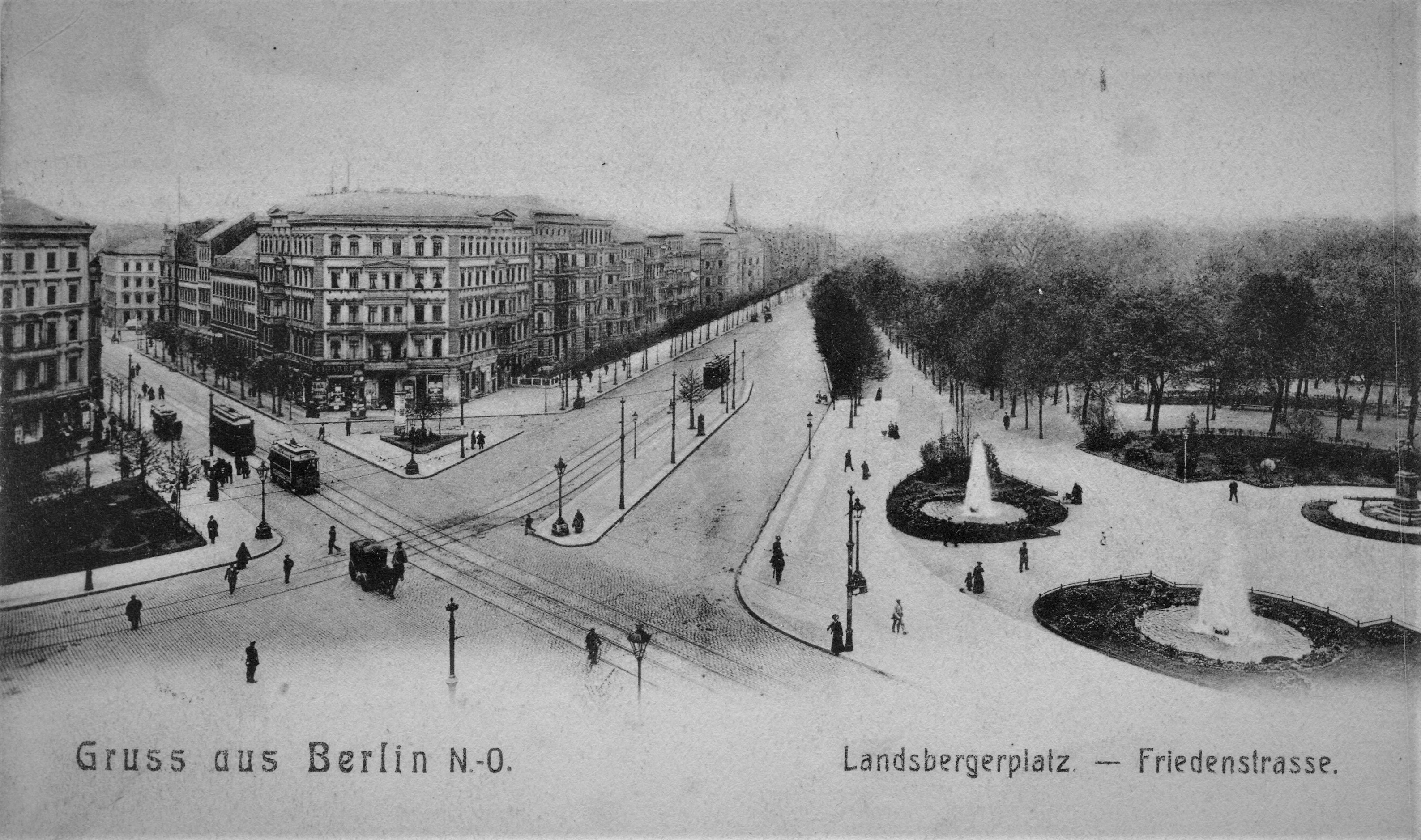 Die Friedenstraße ist eine Straße im Berliner Bezirk Friedrichshain-Kreuzberg, Ortsteil Friedrichshain. Angelegt und benannt wurde sie 1871-1876 auf dem Communicationsweg außerhalb der abgerissenen Berliner Zollmauer. Bereits seit dem Anlegen und der Bebauung bestand eine Teilung der Straße auf Königstadt und Stralauer Viertel. Aktuell sind es drei unterschiedene Straßenabschnitte: regionale Straßenverbindung im Barnimkiez am Volkspark Friedrichshain, am Platz der Vereinten Nationen als Parkzone, südlich im (Planungsraum) "Friedenstraße" als Ergänzungsstraße. Das Bild zeigt den Blick über den Landsberger Platz/ Landsberger Straße in die Friedenstraße am Friedrichshain entlang.